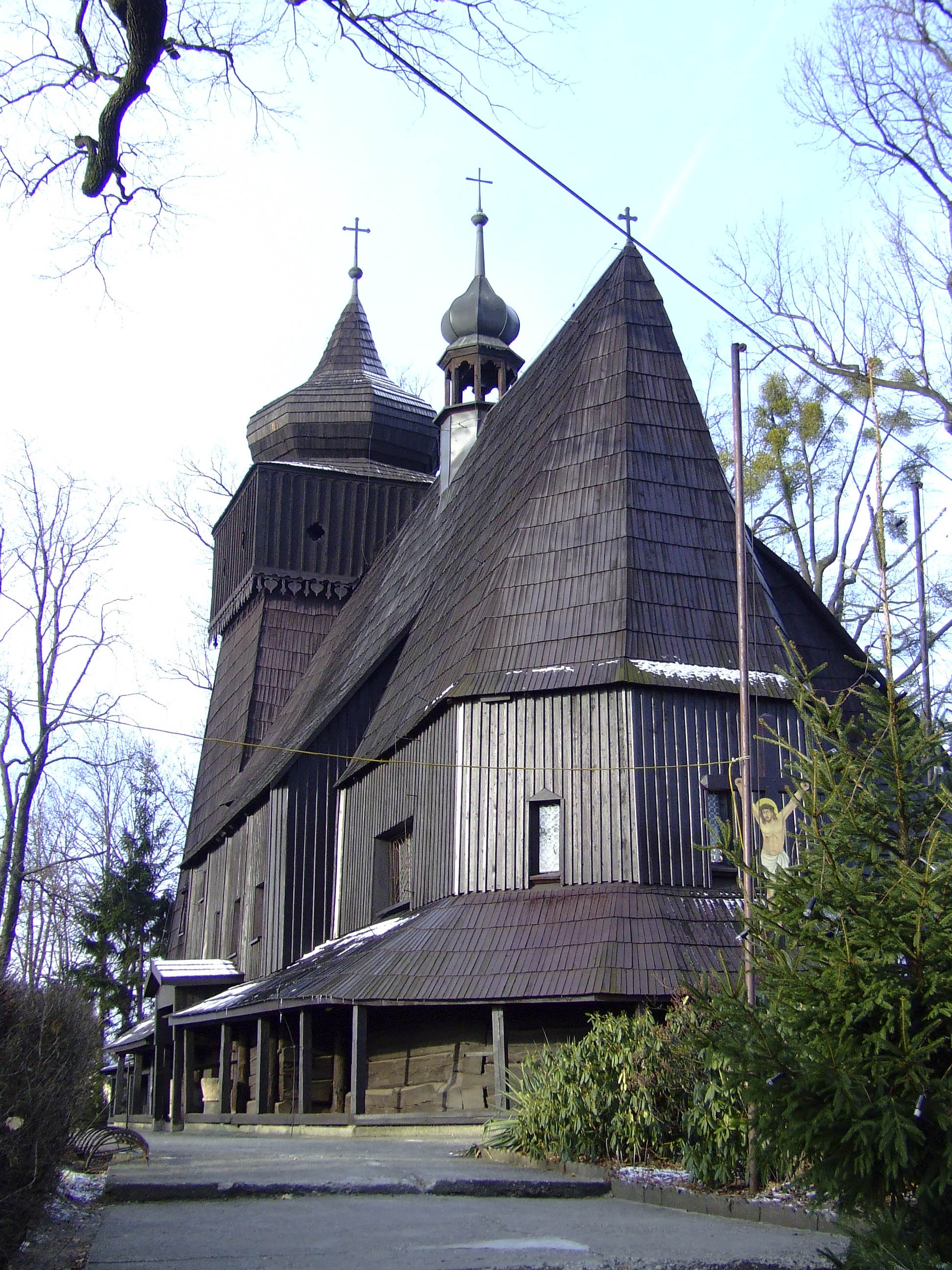 Kościół pw. Wszystkich Świętych w Łaziskach, gmina Godów, pow. wodzisławski, woj. śląskie